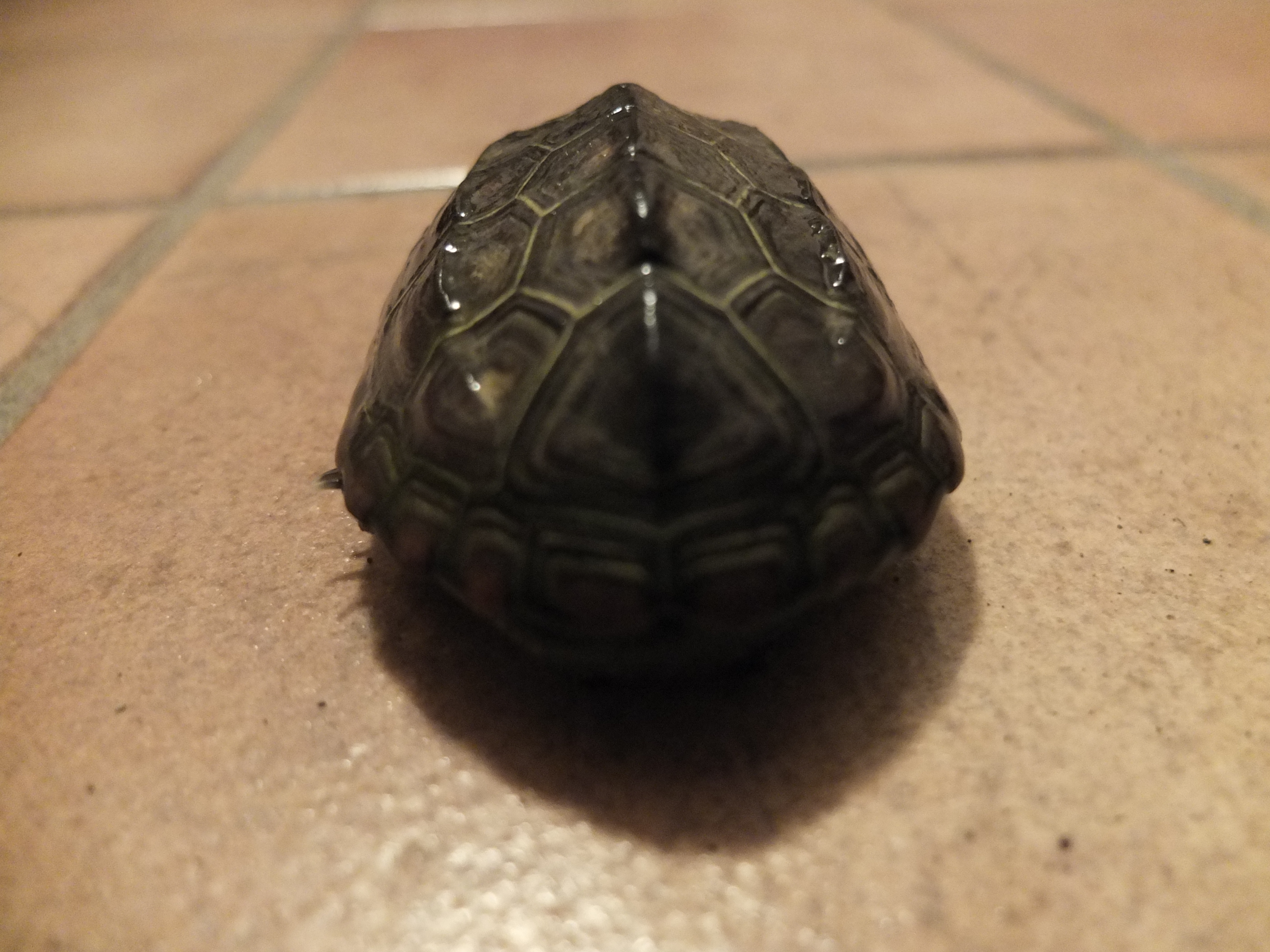 個体はクサガメ 甲羅DSF2707と同じ。 後ろから撮影。 クサガメの臀甲板が二枚ということがわかる画像です。